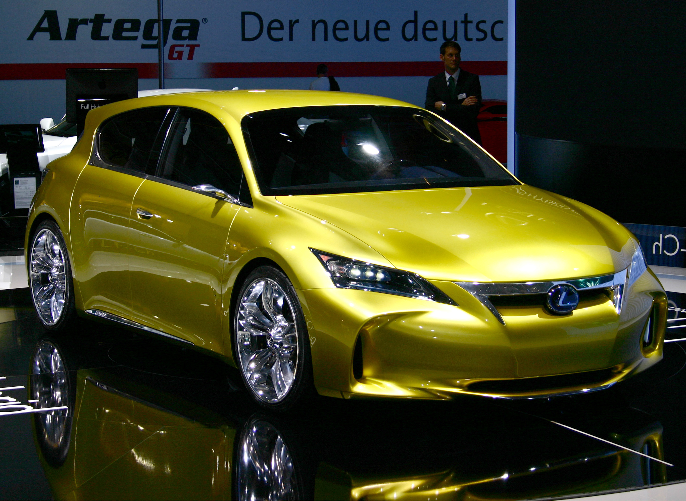 IAA 2009 IAA 2009